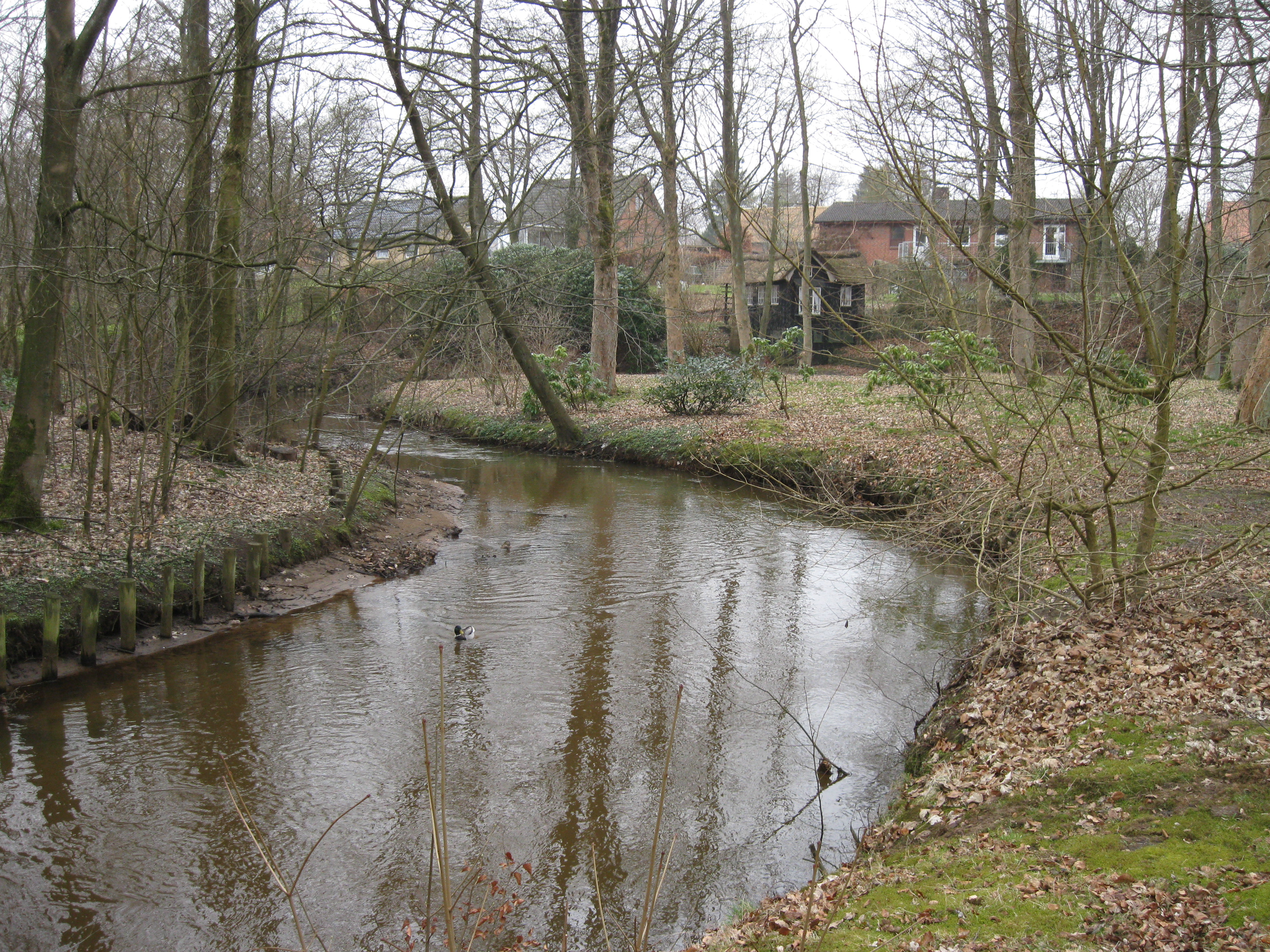 Brande Å